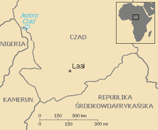 Język laal na mapie Afryki